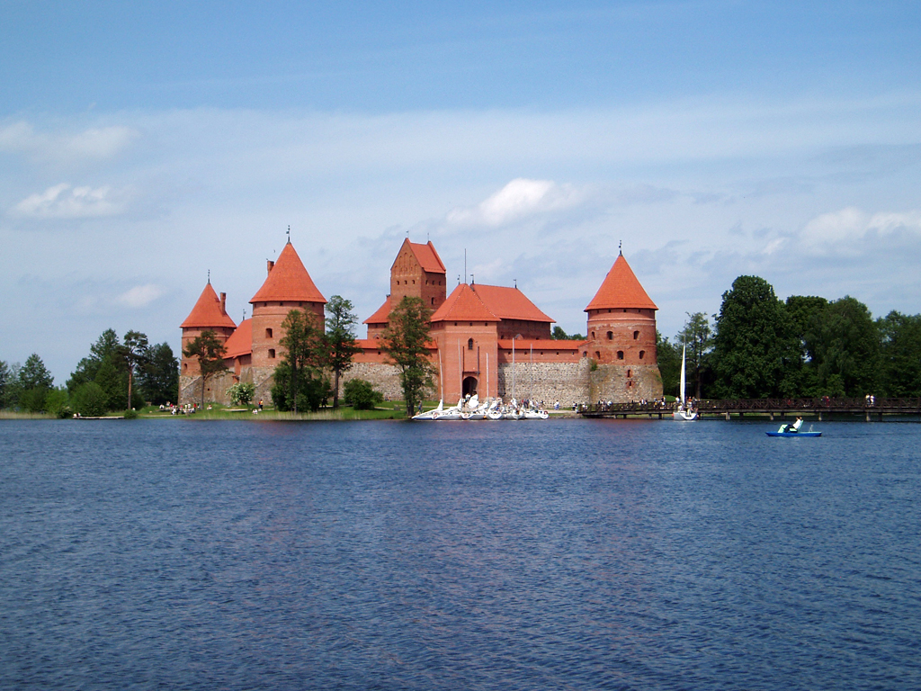 Trakai, Vilnius Lithuania